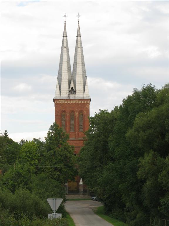 Panemunėlio Šv. Juozapo Globos bažnyčia